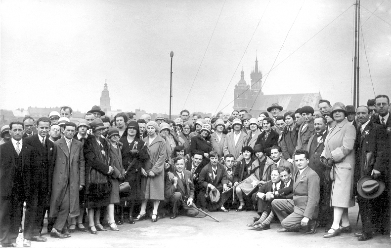 Gesamtpolnischer Esperanto-Kongress, Krakau 1928. Gruppenfoto der Teilnehmer auf dem Dach eines Hochhauses